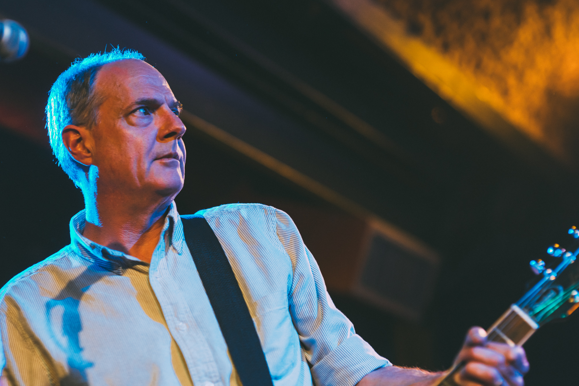 Guided by Voices tijdens een optreden in de Belly Up Tavern in San Diego (Californië)